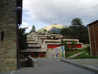 Altbau der Kantonsschule Brig